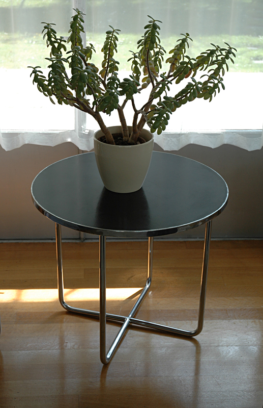 Titel: Tafel Gispen 501 Jaar: 1933 Ontwerper: W.H. Gispen Omschrijving: Ronde tafel op onderstel van verchroomd stalen buis, met triplex blad Collectie: NAi Objectnummer: 29 Tafel 501, W.H. Gispen (1933)